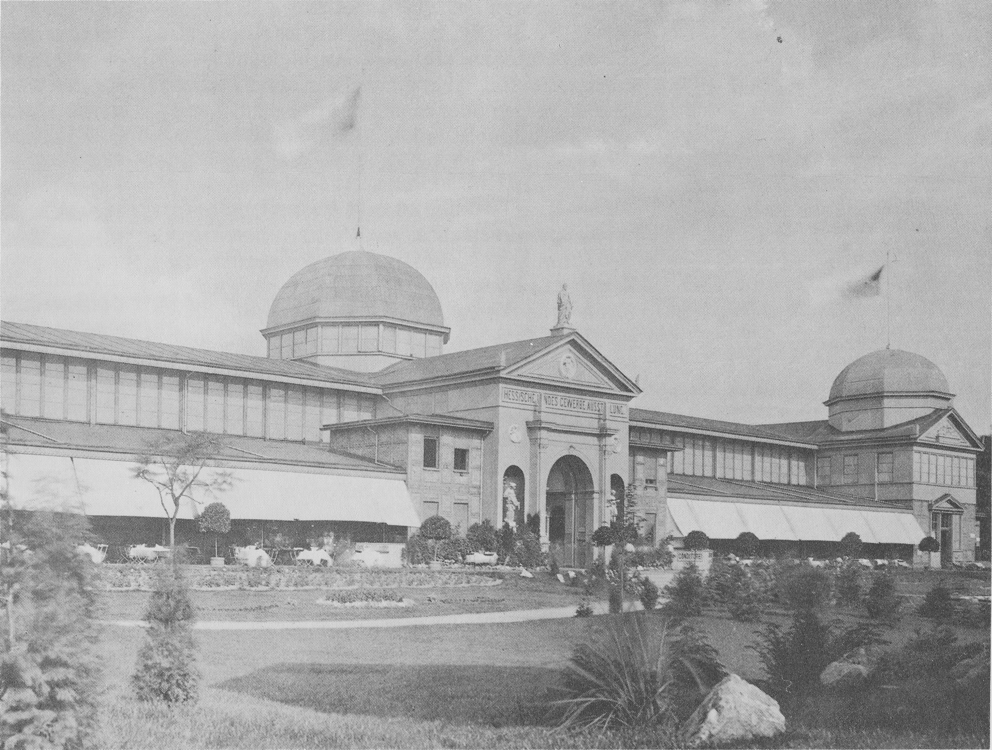 Hessische Landes-Gewerbe-Ausstellung zu Offenbach am Main, Ausstellungshalle 1879